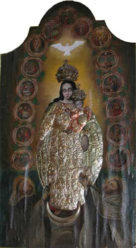 Уручэнне ружанца святому Дамініку. XVIII ст. Радунь, Воранаўскі р-н